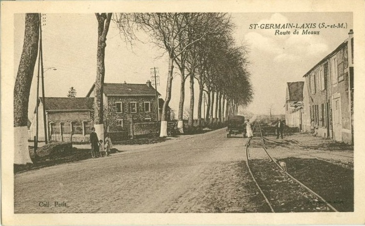 Route de Meaux à Saint-Germain-Laxis en direction de Crisenoy, au début du XXème siècle. On distingue les rails du tramway.